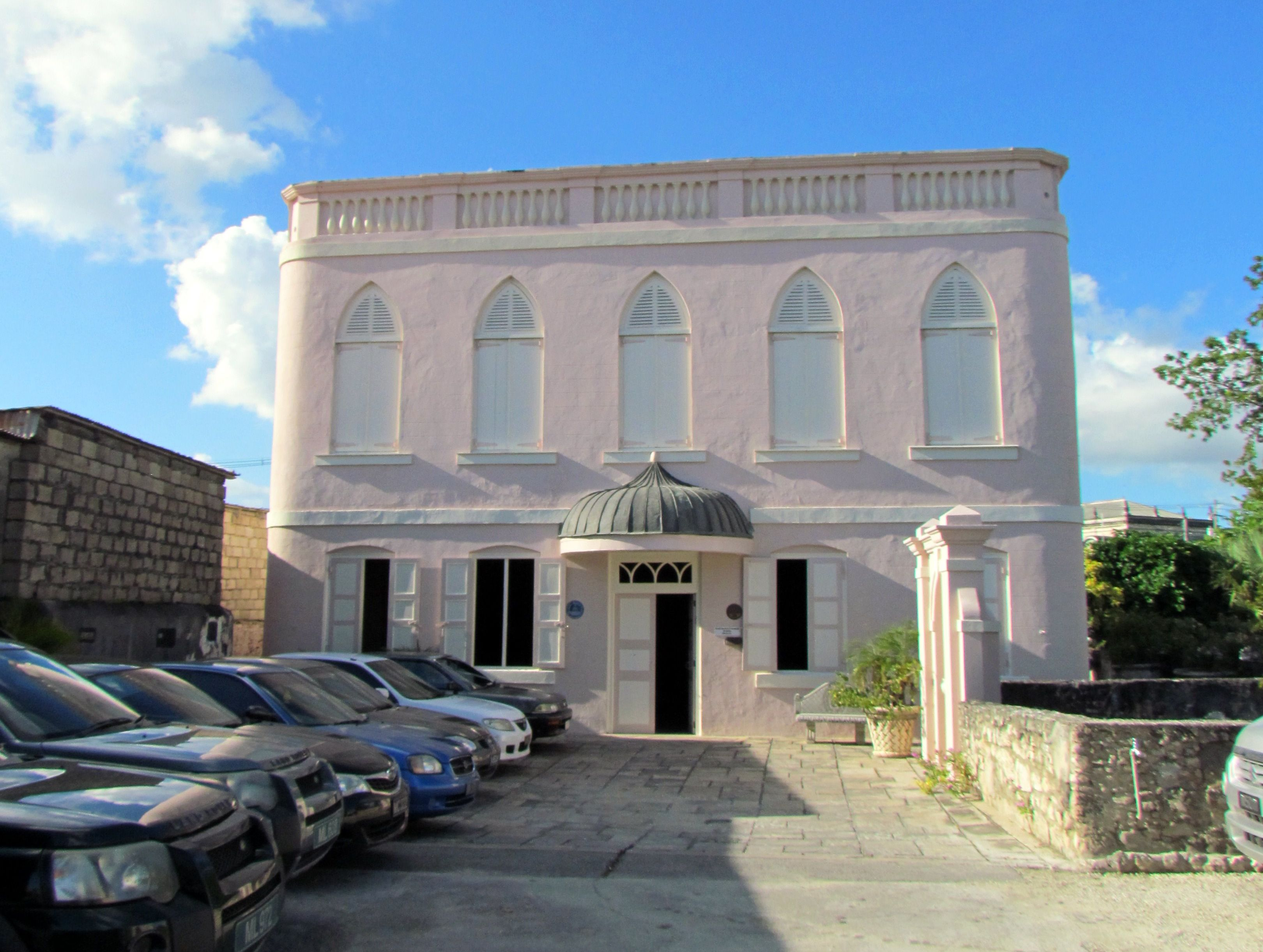 Nidhe Israel Synagogue - Bridgetown, Barbados